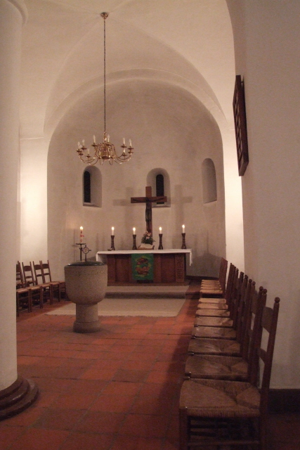 Dorfkirche Berlin-Mariendorf, Chor und Altar Fotograf: Harald Rossa Datum: November 2006 Höher aufgelöste Version ist verfügbar